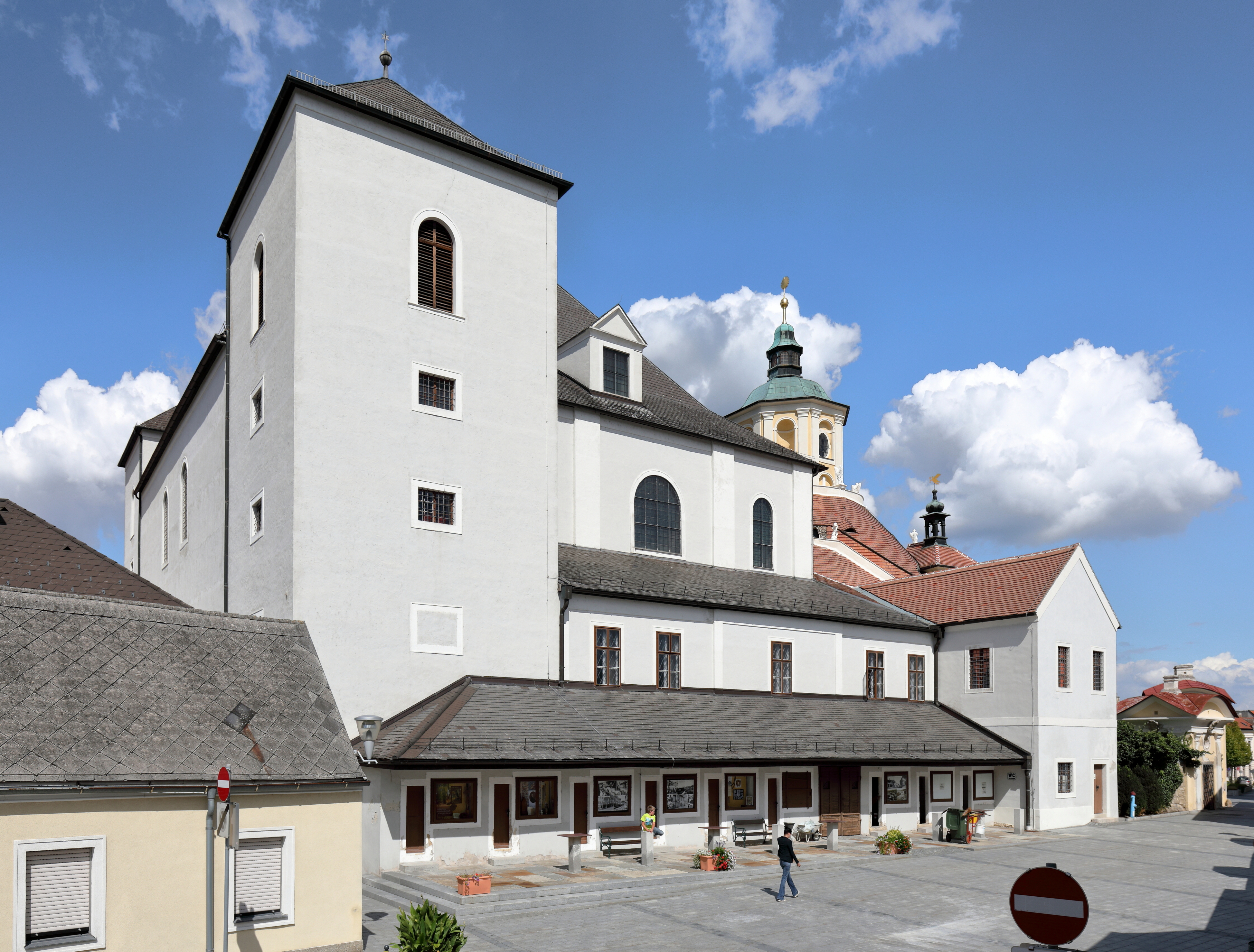 Südansicht der Haydnkirche bzw. röm.-kath. Bergkirche Mariä Heimsuchung mit ehemaligen Devotionalienläden in der burgenländischen Landeshauptstadt Eisenstadt. Die Grundsteinlegung der Kirche erfolgte 1715. Nach einer Bauunterbrechung erfolgte um 1765 die Weiterführung des Baues und 1803 die feierliche Einweihung. Der östlich angebaute Kalvarienberg wurde bereits von 1701 bis 1710 errichtet.